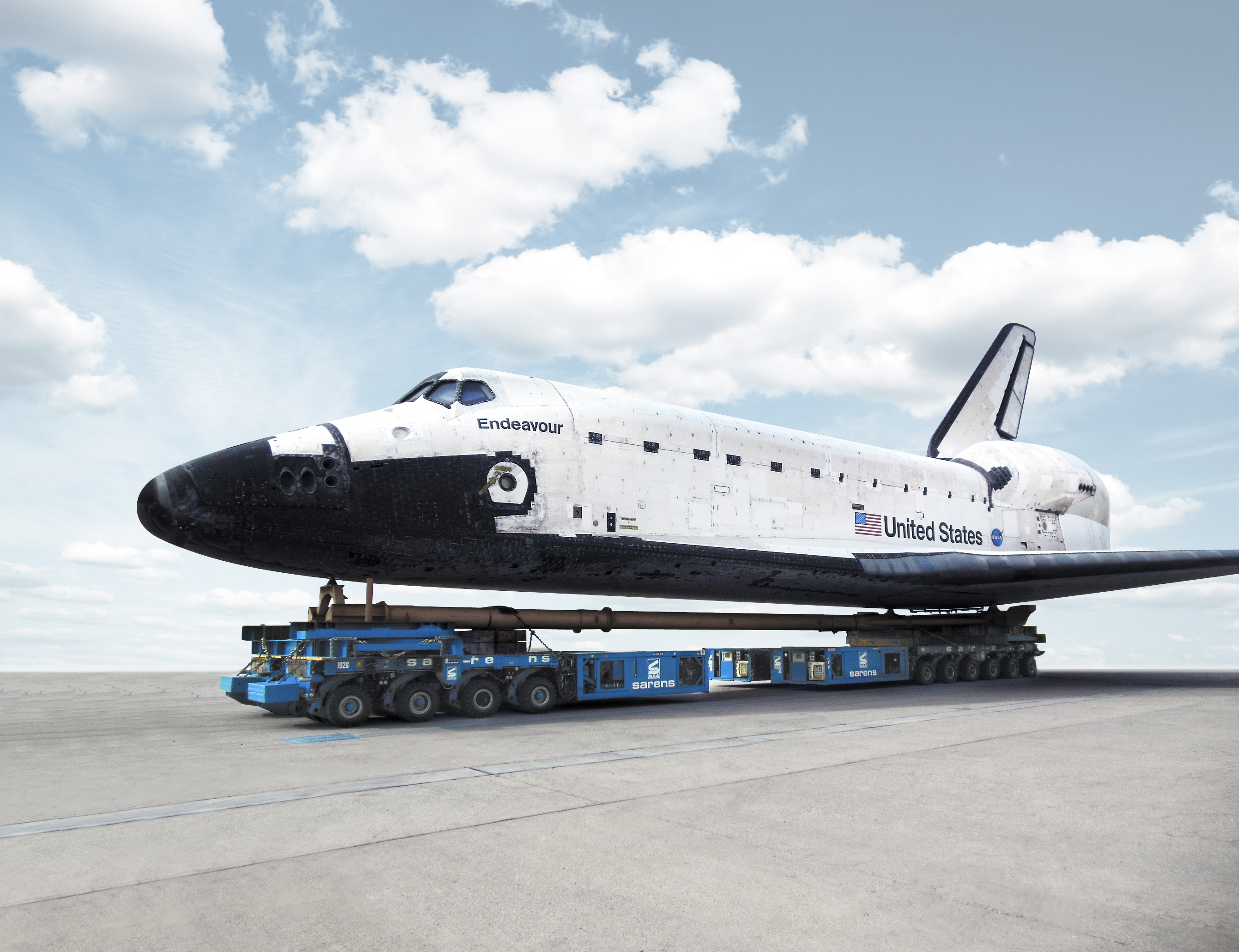 Selbst angetriebene Module von KAMAG transportieren Raumfähre Endeavour für die US-amerikanische Raumfahrtbehörde NASA.